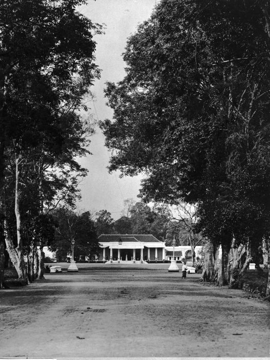 Foto. Het huis van de resident aan de Kanarielaan te Banjoemas.